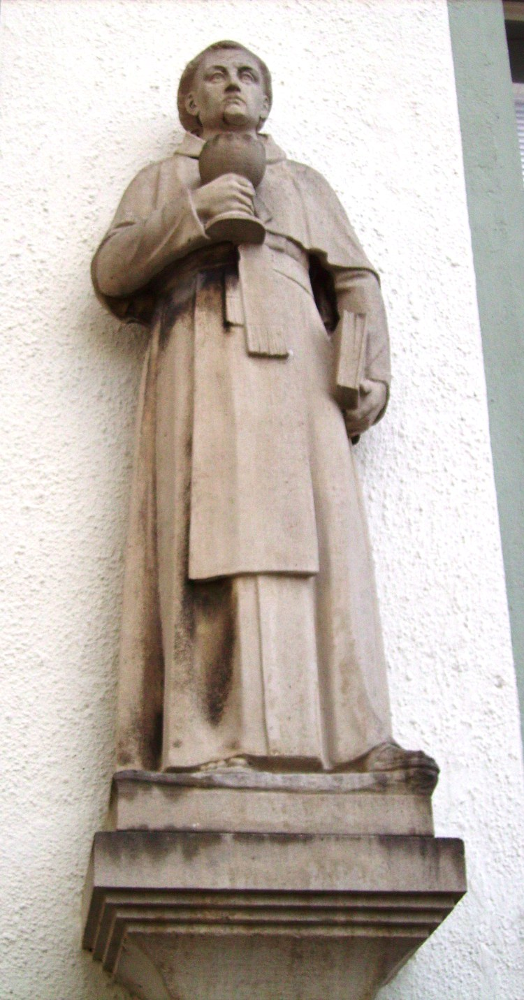 Statue von Karl Berg (Abt Kloster Wedinghausen 1715-1724)